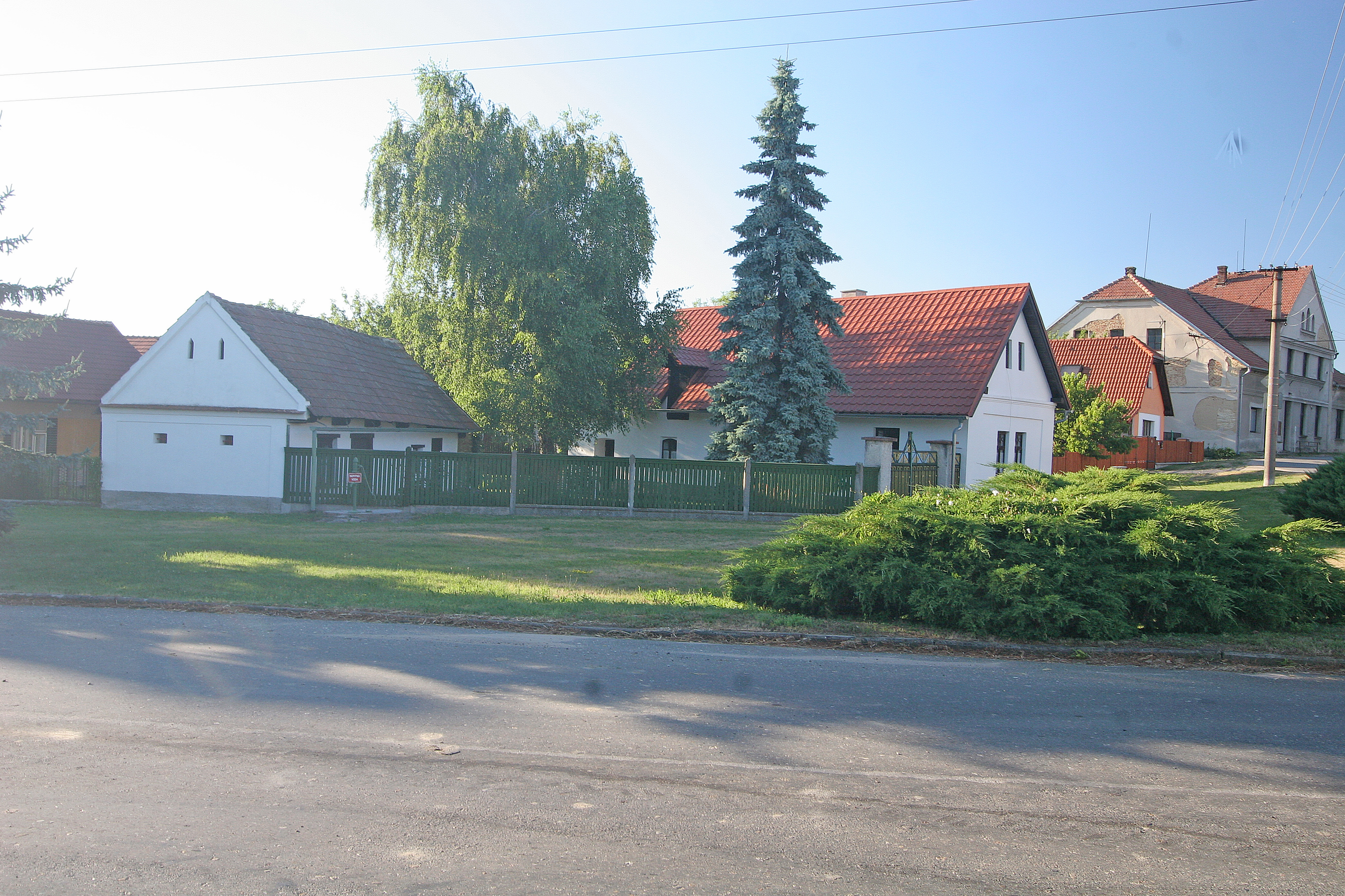 Lišice čp. 7